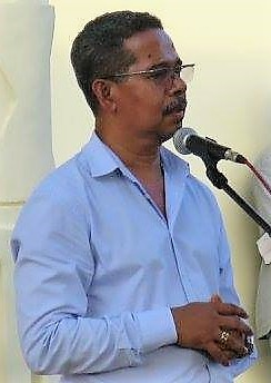 Miguel Manetelu em Jardim dos Heróis e Martires da Pátria em Metinaro